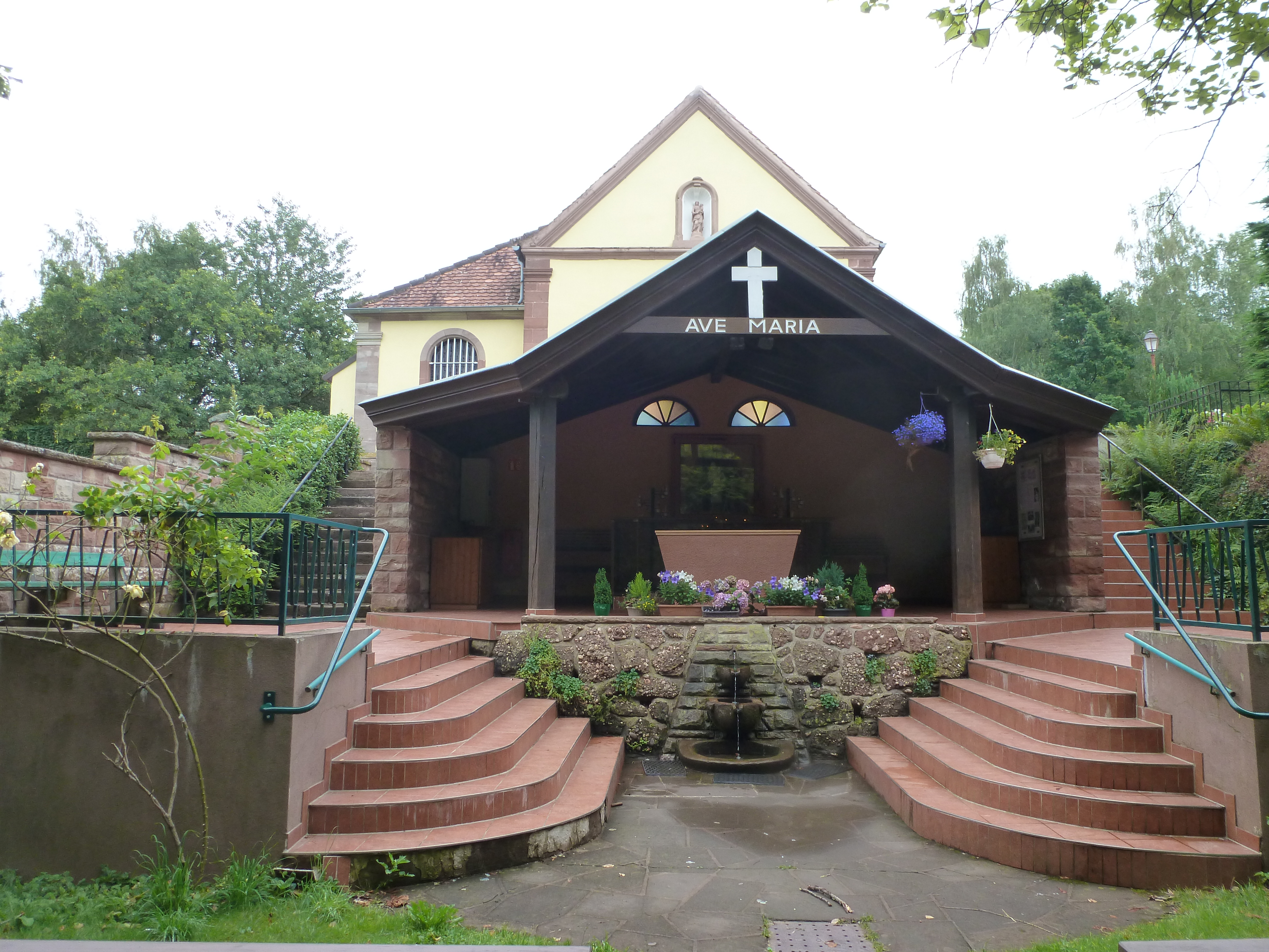 Sanctuaire Notre-Dame de Bonne-Fontaine. Source et statue la surplombant.